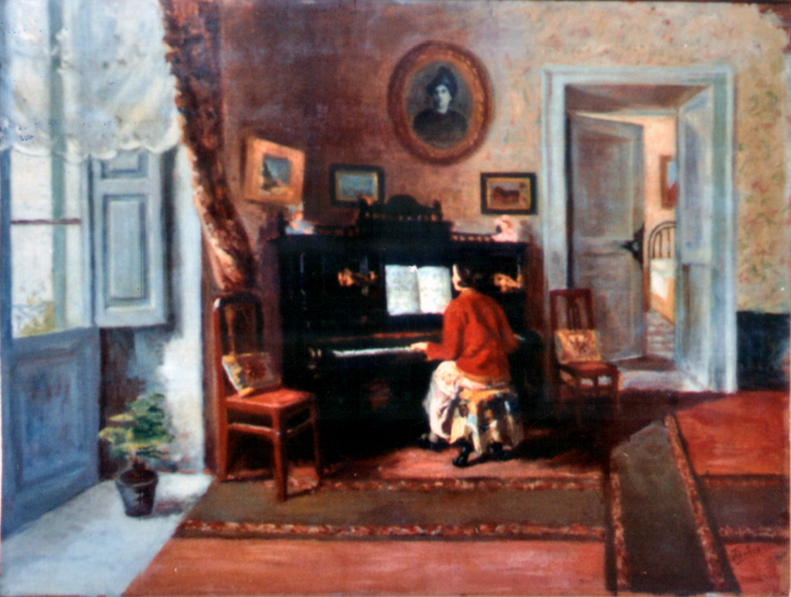 Interno con pianoforte